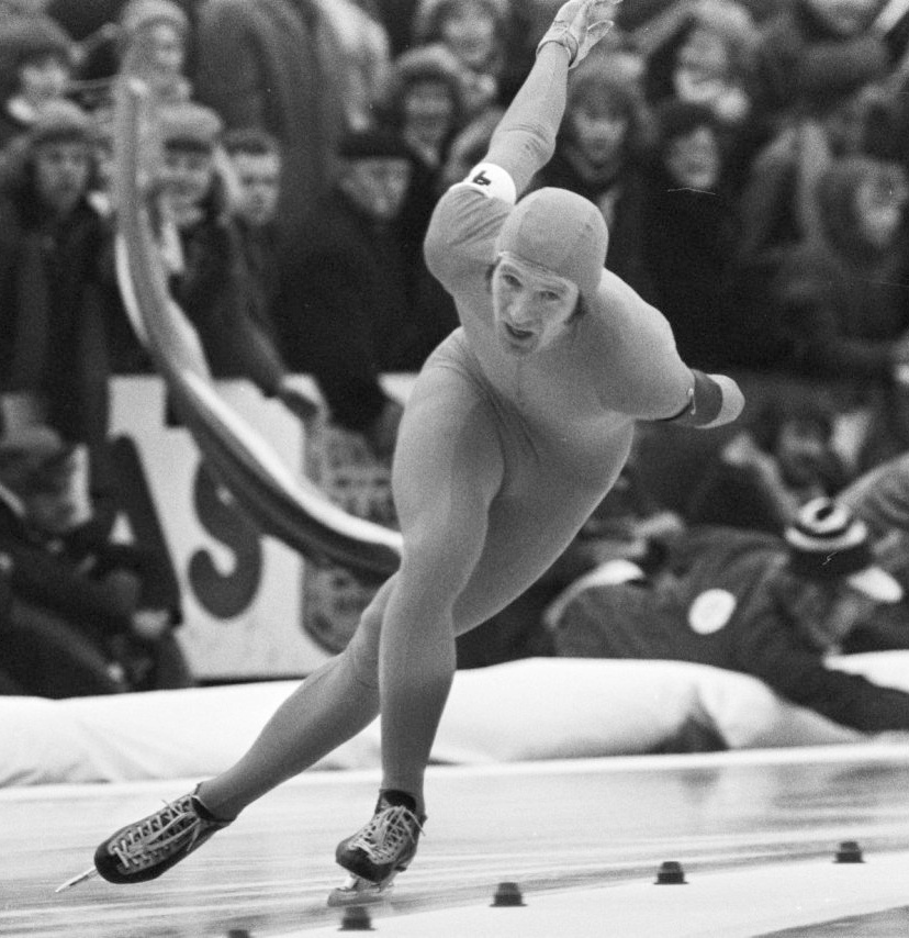 WK-schaatsen heren in Heerenveen; Hans van Helden tijde de 5.000 meter